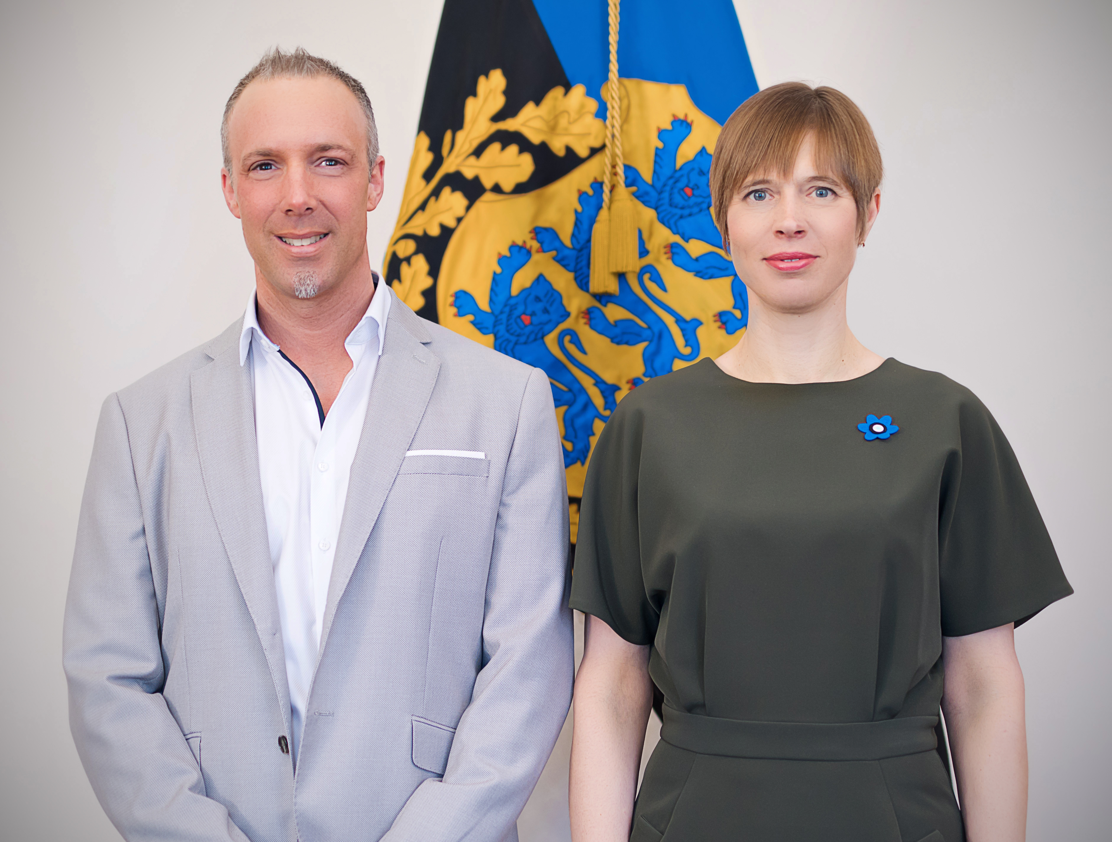 Sven Lilienström, Gründer der Initiative Gesichter der Demokratie, und Estlands Staatspräsidentin Kersti Kajulaid